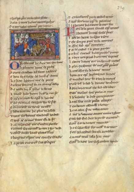 Manuskript of Garin de Monglane